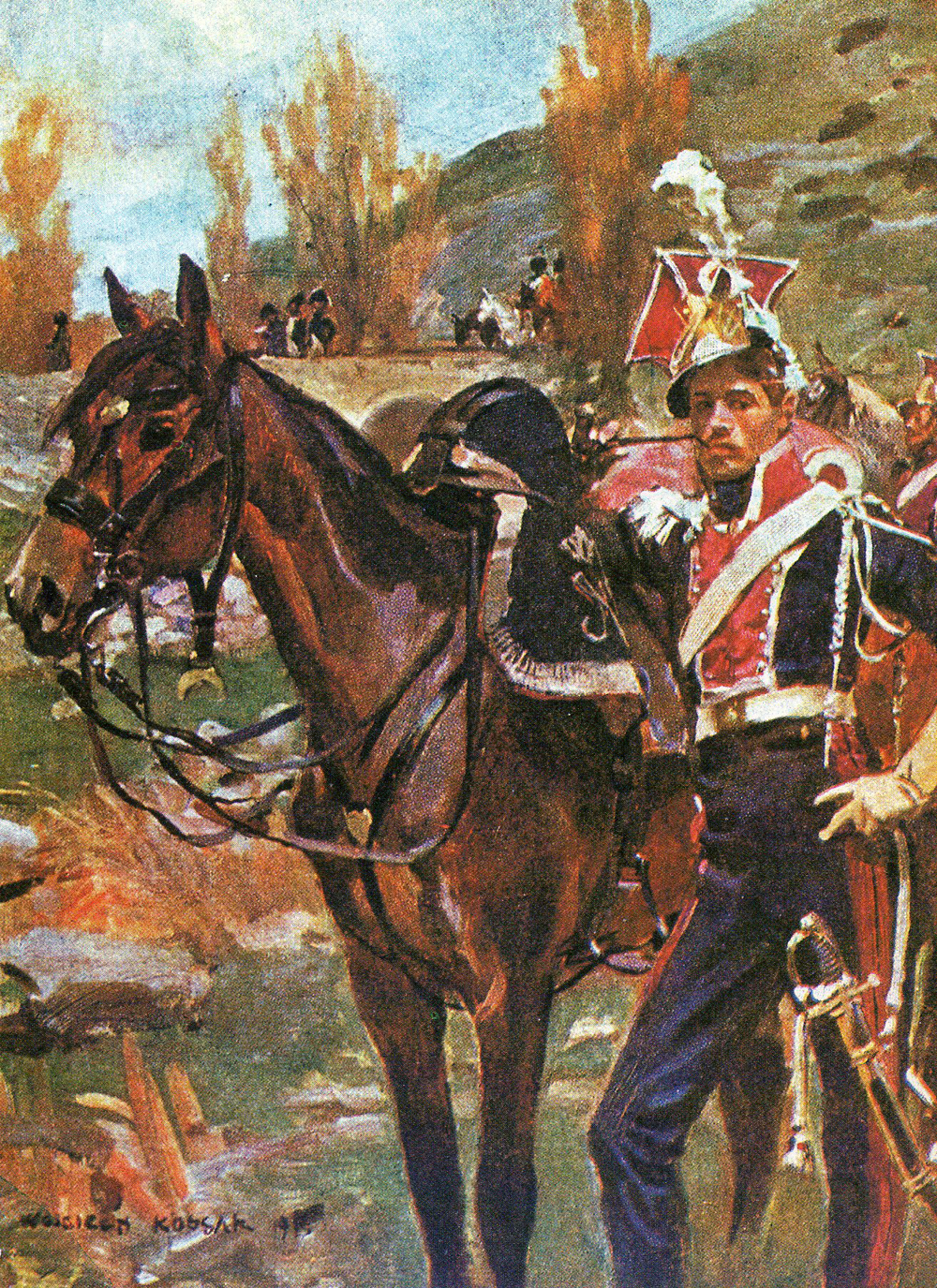 1808, Battle of Somosierra - Chevau legere polonais